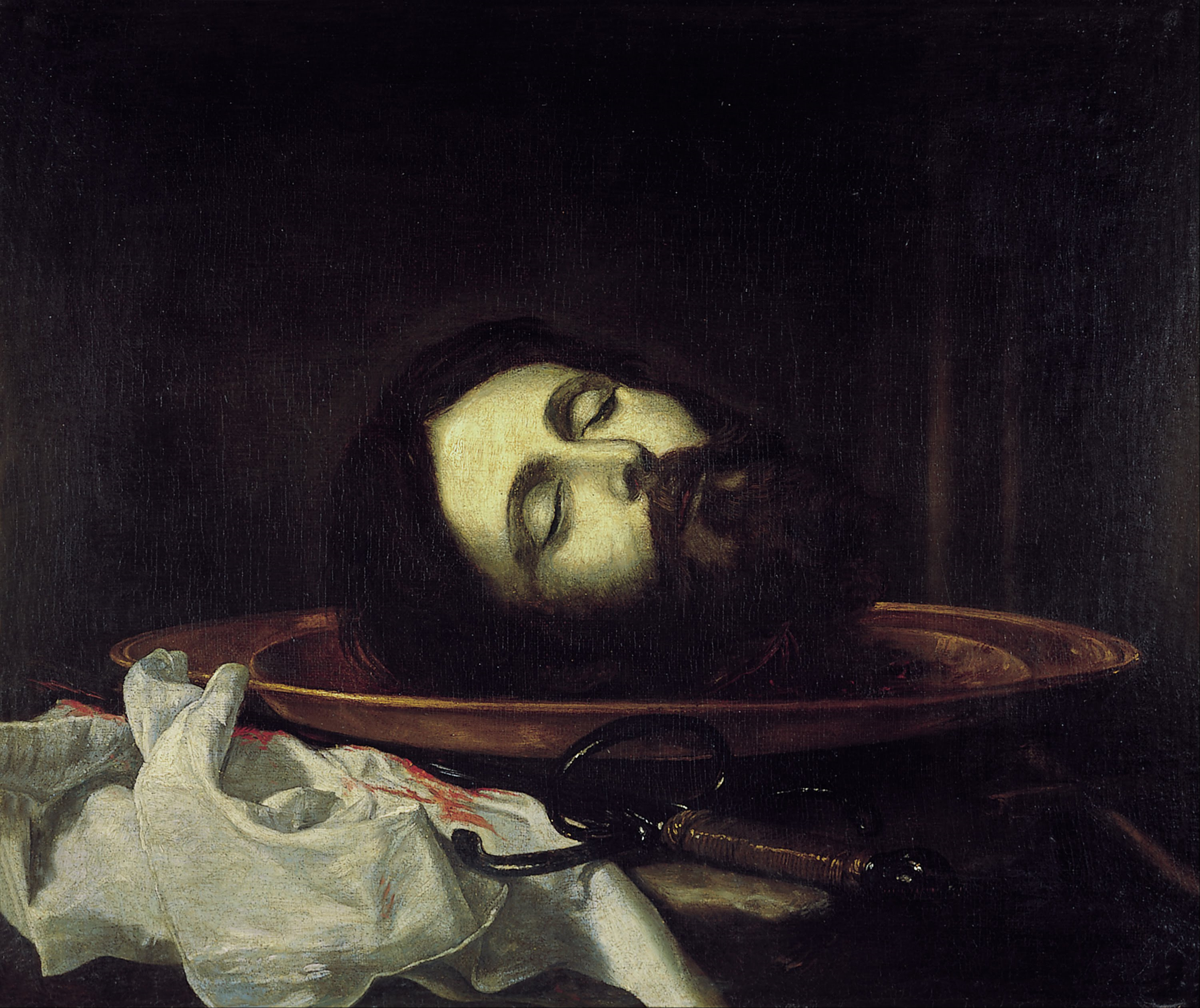 El lienzo muestra la cabeza cercenada y colocada en una bandeja del profeta San Juan Bautista, precursor de la venida de Cristo.